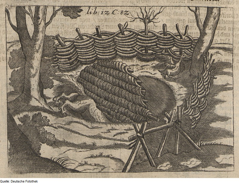 Original image description from the Deutsche Fotothek Jagdwesen & Jagd & Raubtier & Falle